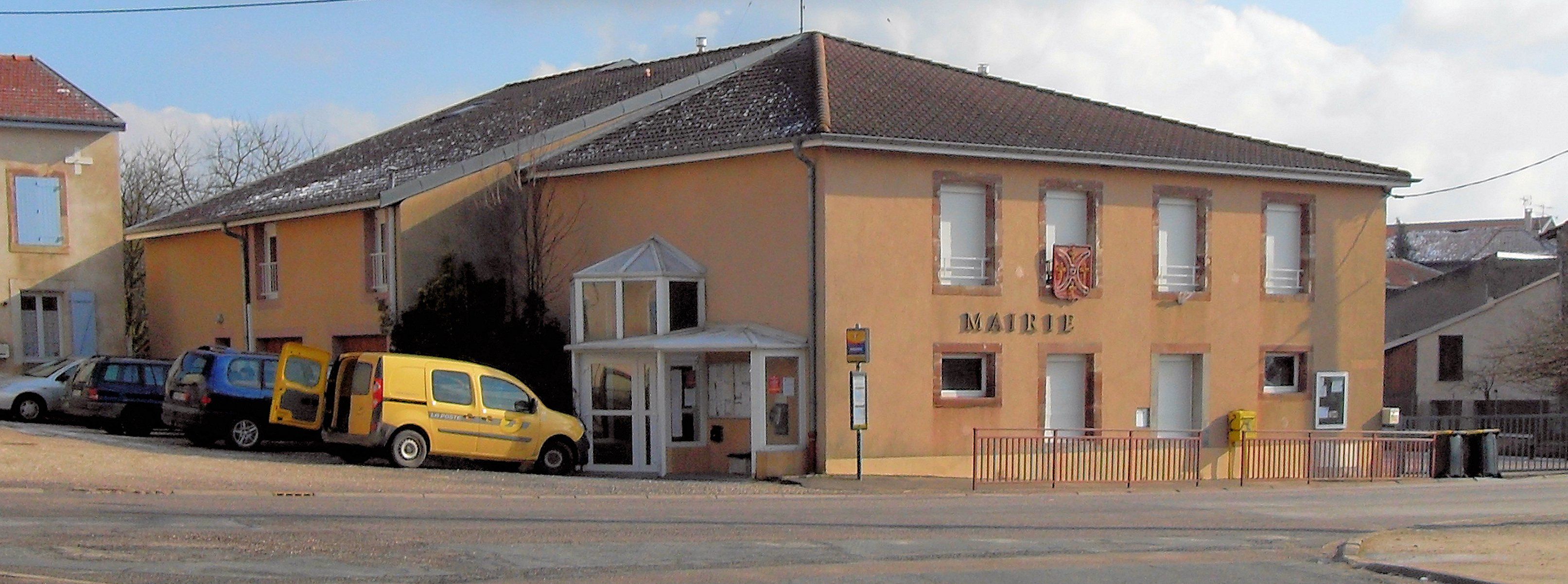 La mairie de Xermaménil